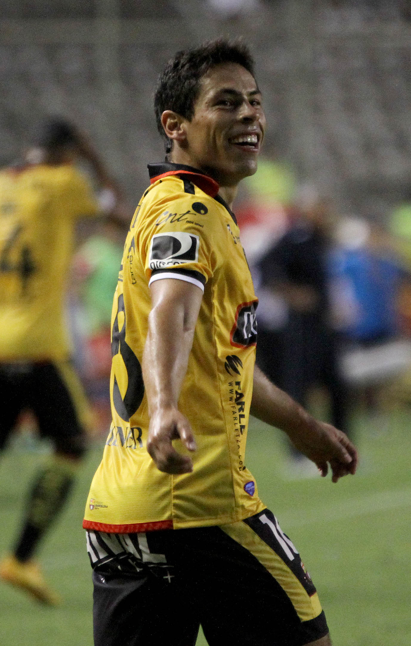 Guayaquil, 26 oct (Andes).- Encuentro entre Barcelona y El Nacional.